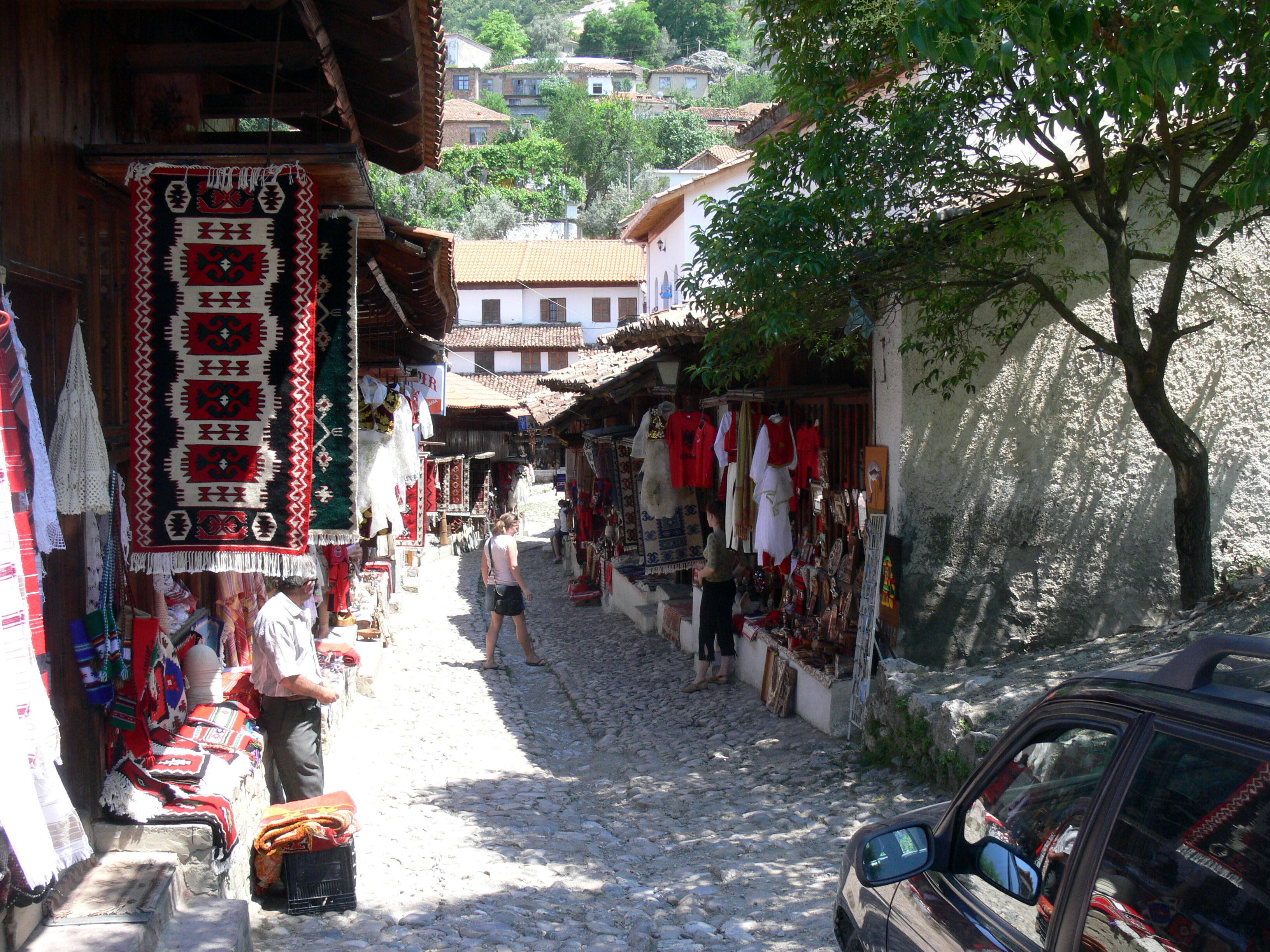 Souvenirstraße von Krujë